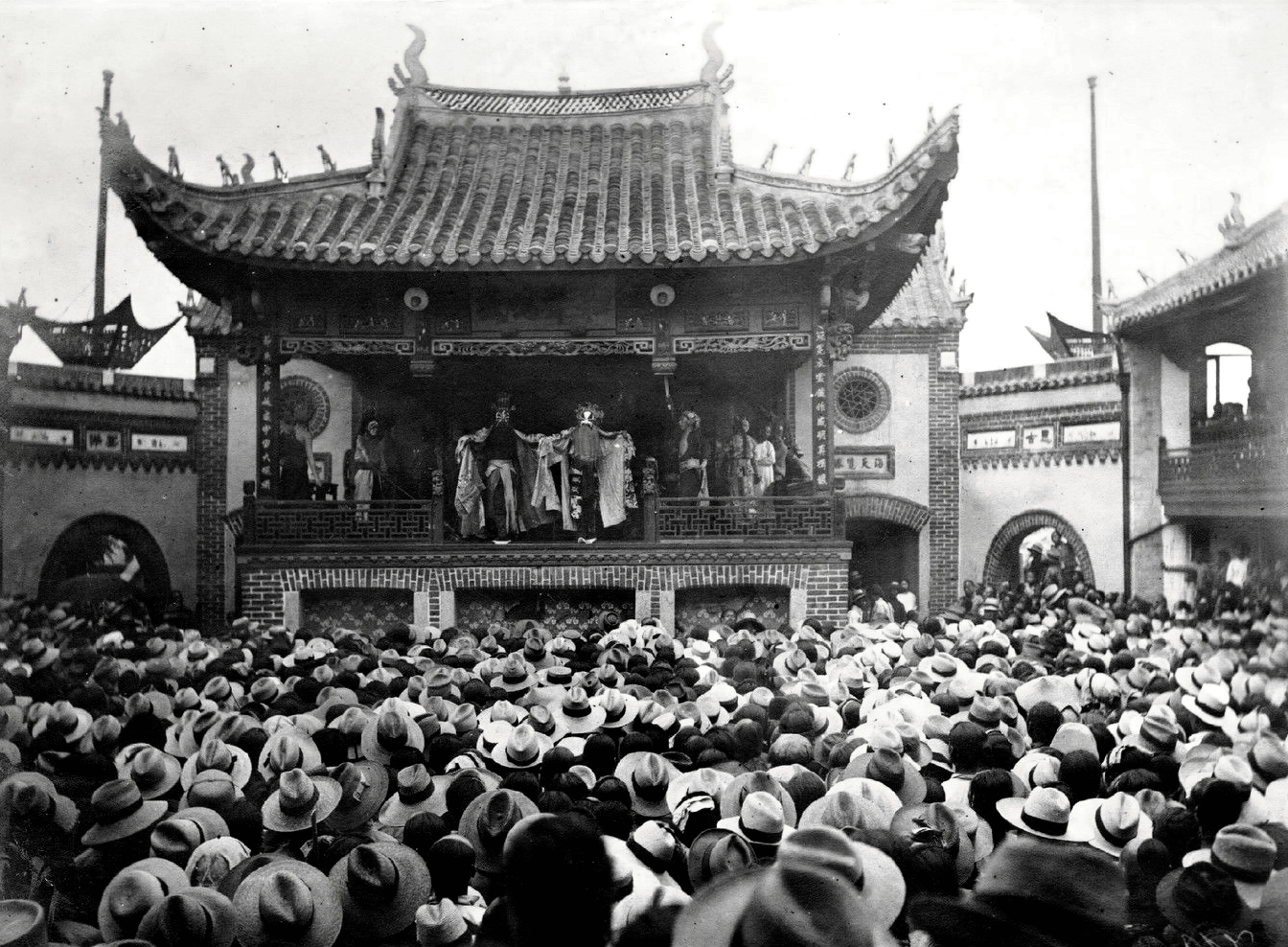 青岛三江会馆戏楼